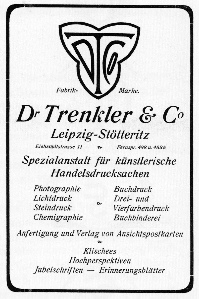 Werbeanzeige der Graphischen Kunstanstalt Dr. Trenkler & Co. Leipzig von 1907 mit dem Firmensignet